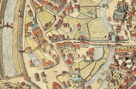 Ausschnitt aus dem Vogelschau-Plan von Everhard Alerdinck: gelb umrandet die Niederlassung der Fraterherren (Brüder vom Gemeinsamen Leben) mit Kapelle und Konventsgebäude; rechts oben St. Petri, unten die Georgskommende des Deutschen Ordens